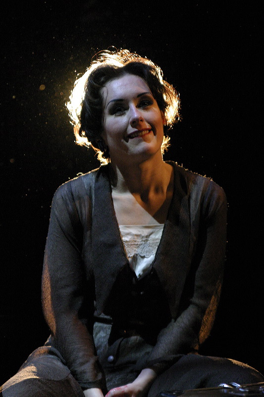 Annica Edstam.